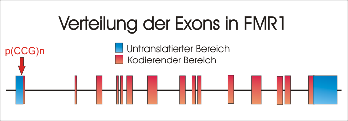 Genaufbau bei FMR1. Der schwarze Strang stellt das gesamte Gen dar, die darauf abgebildeten Blöcke die Position der Exons innerhalb des Gens. Die roten Blöcke beinhalten den kodierenden Bereich, während die blauen Blöcke der mRNA nicht translatiert werden.